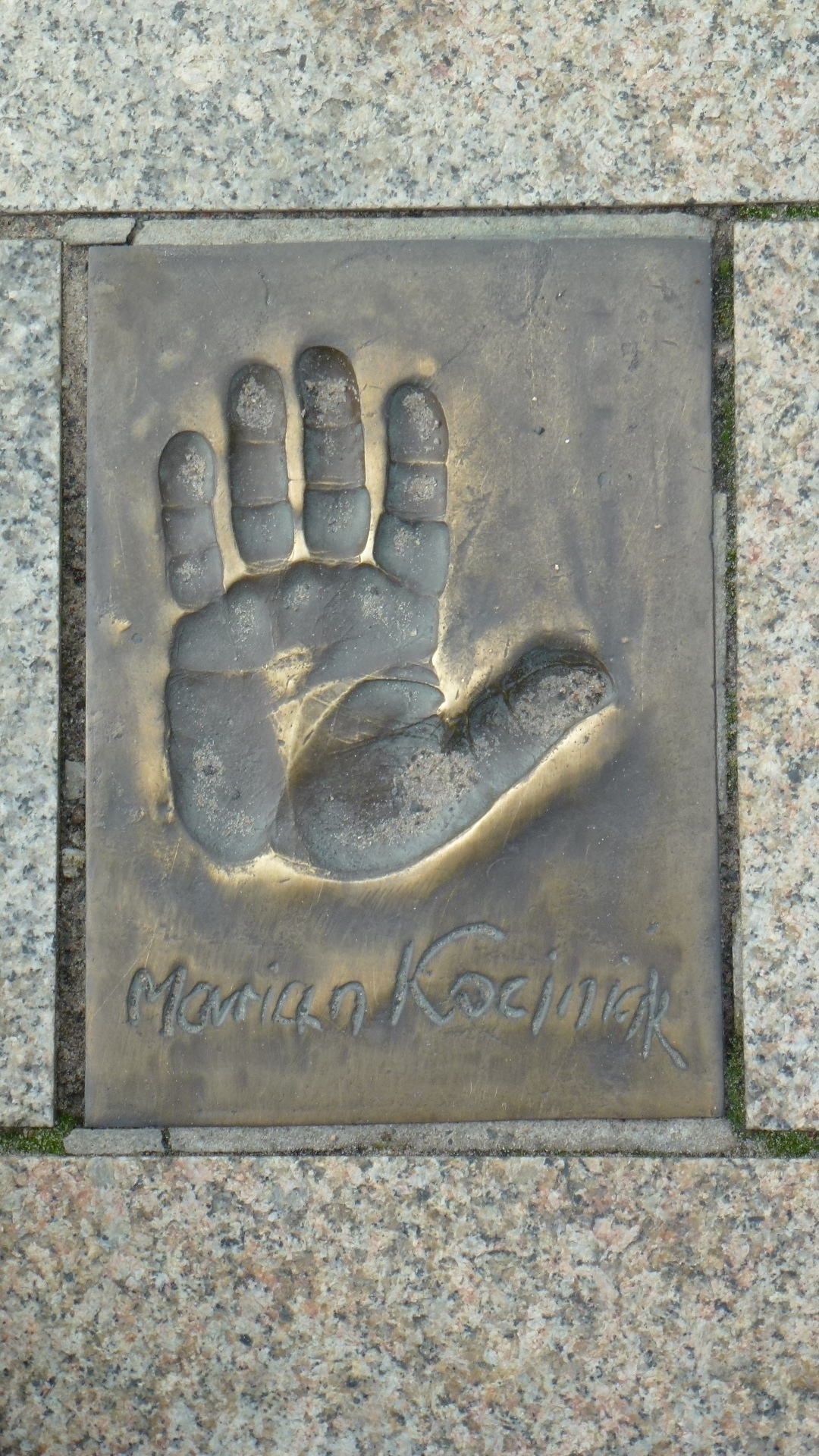 Odcisk gwiazdy na ul. Aleji Gwiazd w Międzyzdrojach woj. zachodniopomorskie pow. kamieński